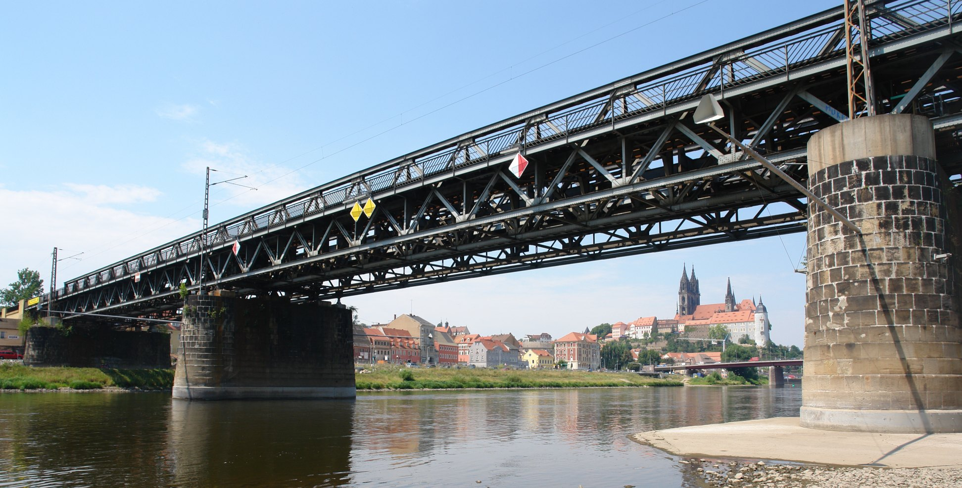 Bahnbrücke über die Elbe bei Meißen